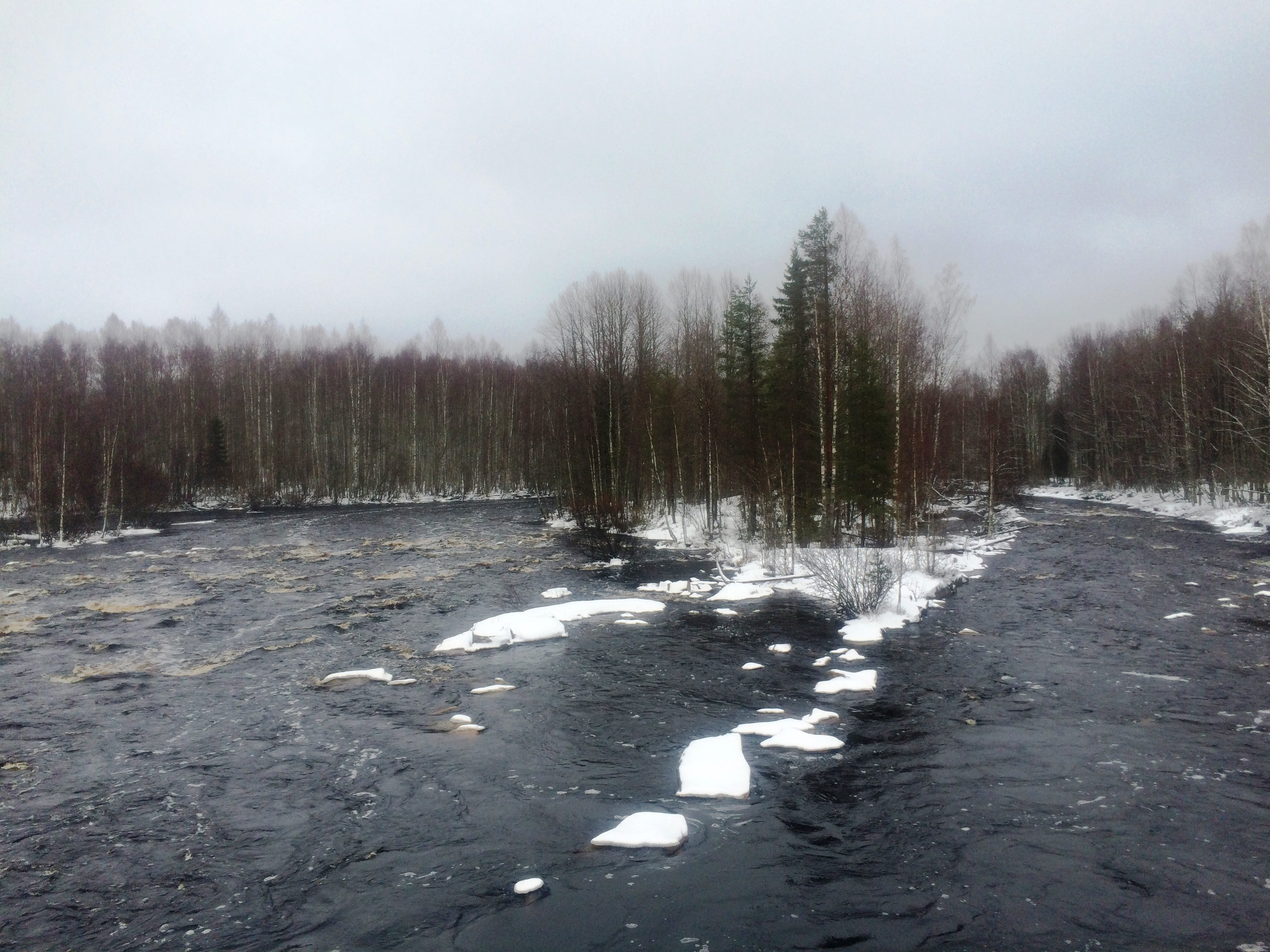 Каратйоки